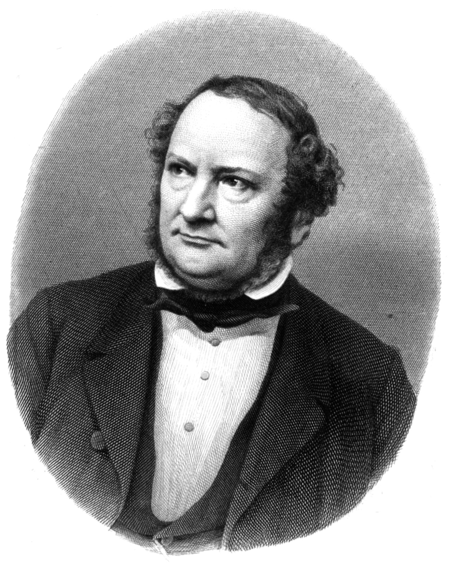 Georg Gottfried Gervinus, Stahlstich